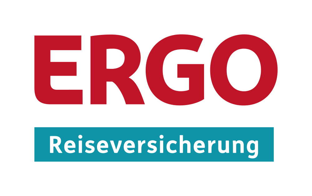 Logo der Ergo Reiseversicherung, roter Schriftzug ERGO, darunter weißer Schriftzug Reiseversicherung, türkisgrün unterlegt